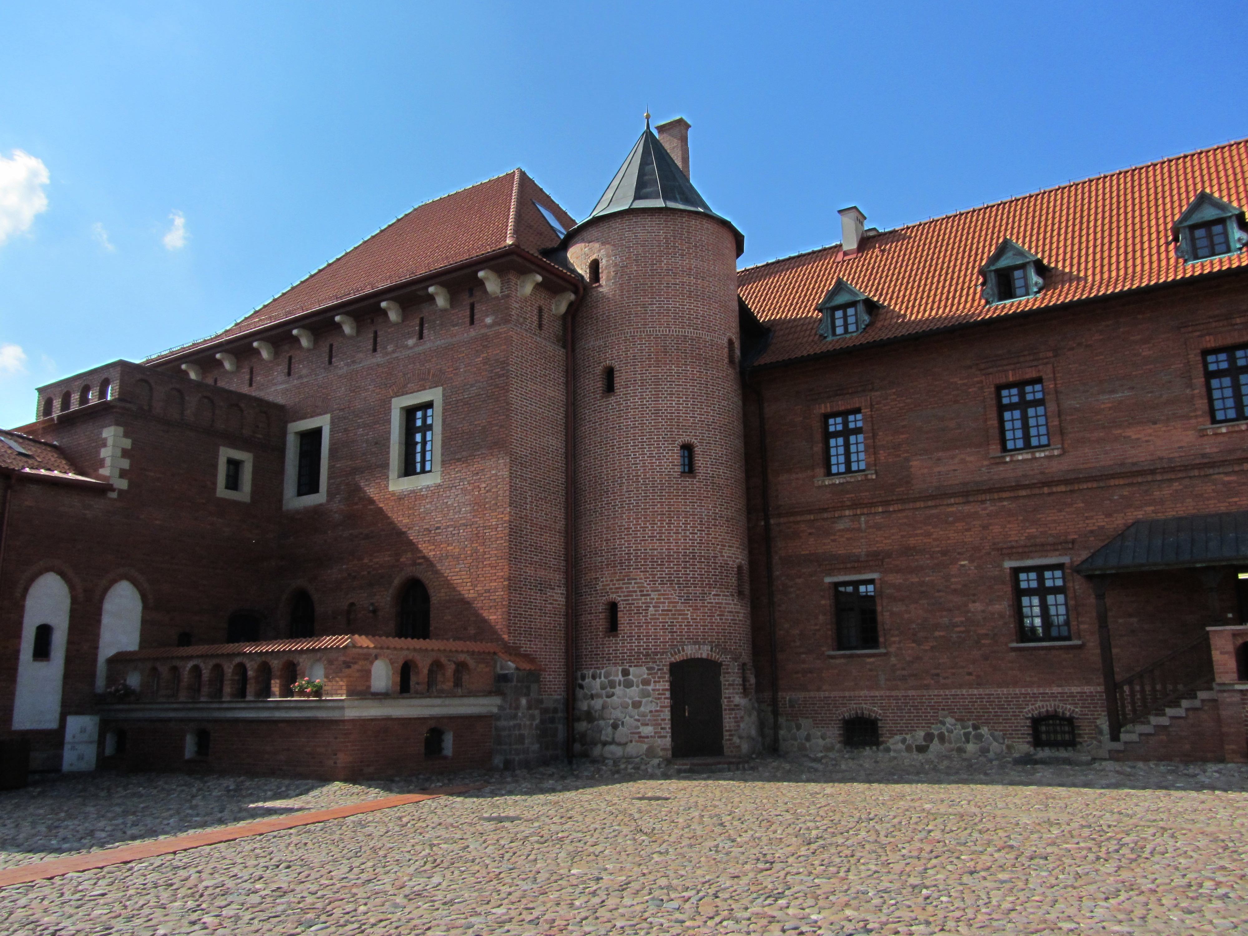 Tykocin - zespół zamku: zamek (zabytek nr 2 z 20.02.1950)